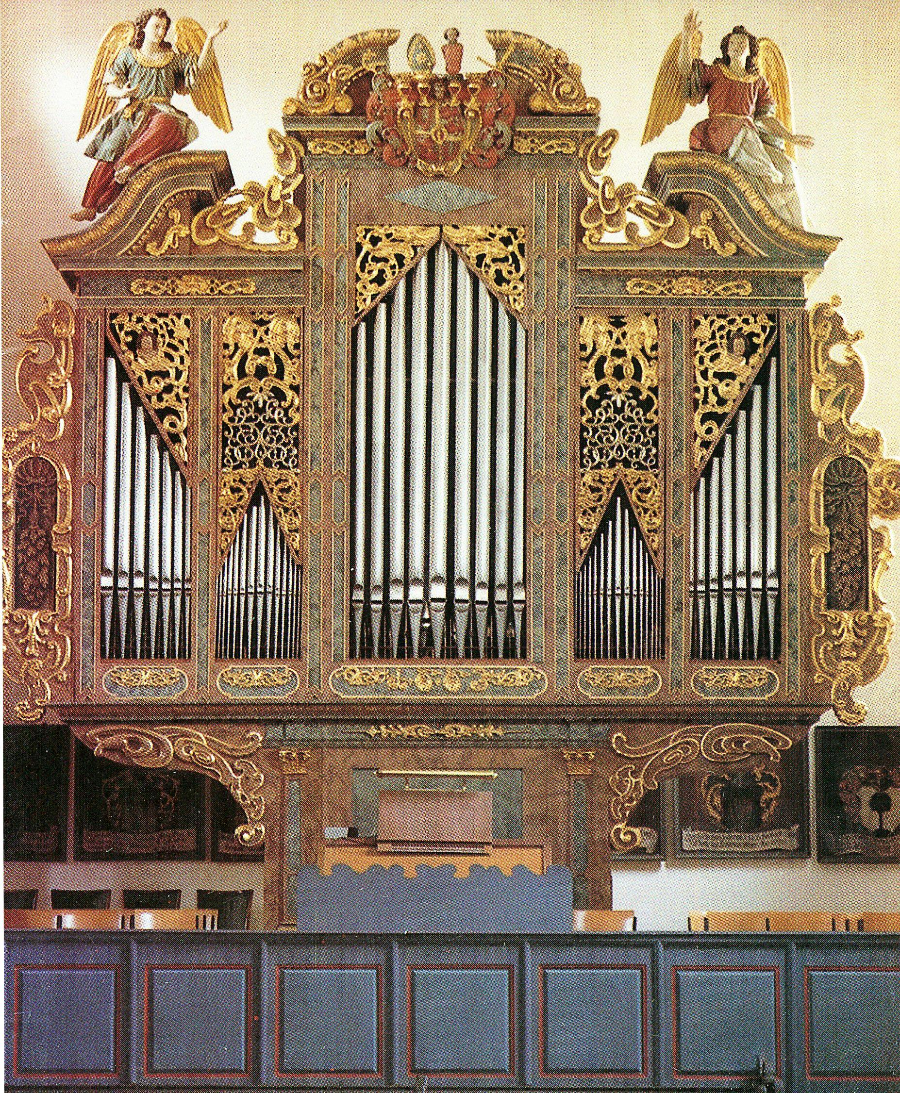 historische Orgel der Kirche von Aufkirchen/Gerolfingen